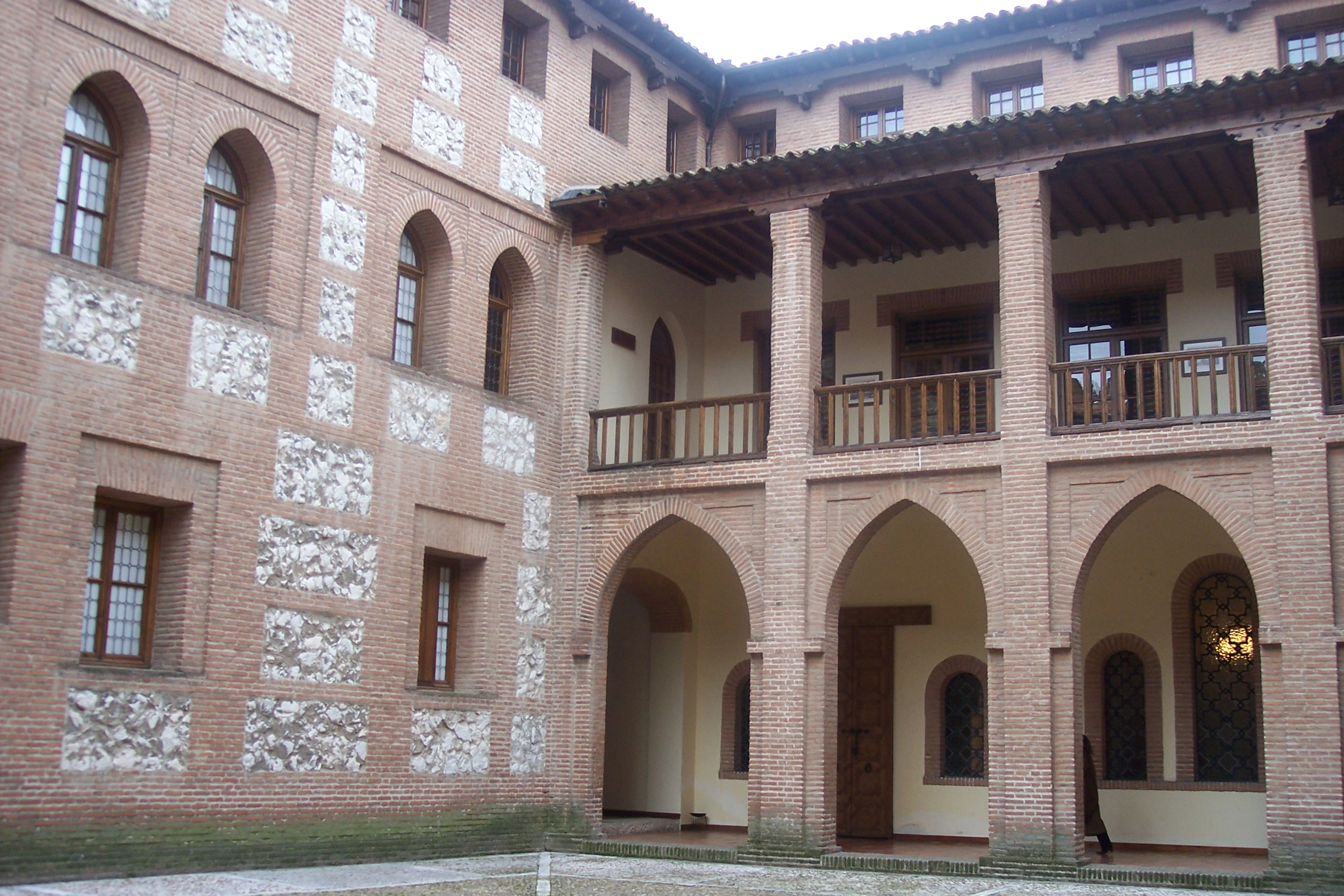 Patio de Armas del Castillo de La Mota en Medina del Campo, Valladolid (España).